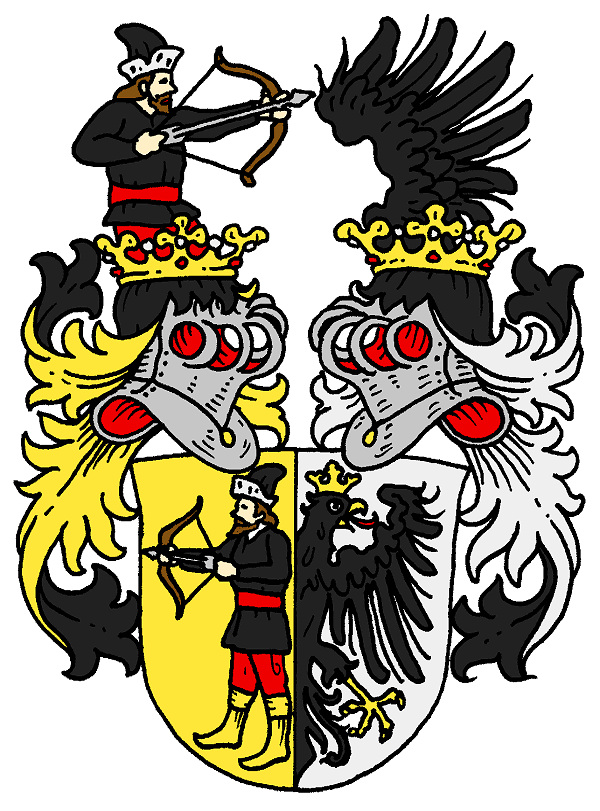 Stammwappen derer von Edelsheim